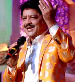 Udit Narayan at 'Shri Krishna Mahotsav 2015'